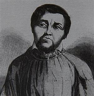 Claude Montcharmont (journal L'Illustration en 1851.